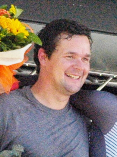 Ronny Lauke als Campionats del món de ciclisme en contrarellotge femení de 2013